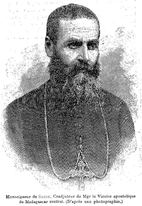 Portrait, d'après une photographie, de Monseigneur de Saune, Coadjuteur de Mgr Vicaire apostolique de Madagascar central.